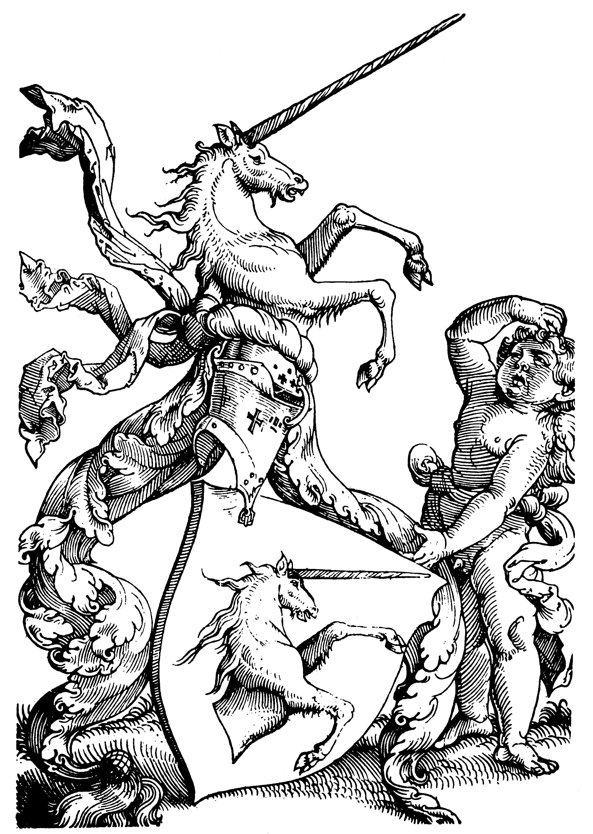 Wappen der Familie Baldung. Künstler: Baldung Grien, Hans Entstehungsjahr: um 1530 Maße: 17,4 × 12 cm Technik: Holzschnitt Epoche: Renaissance Land: Deutschland